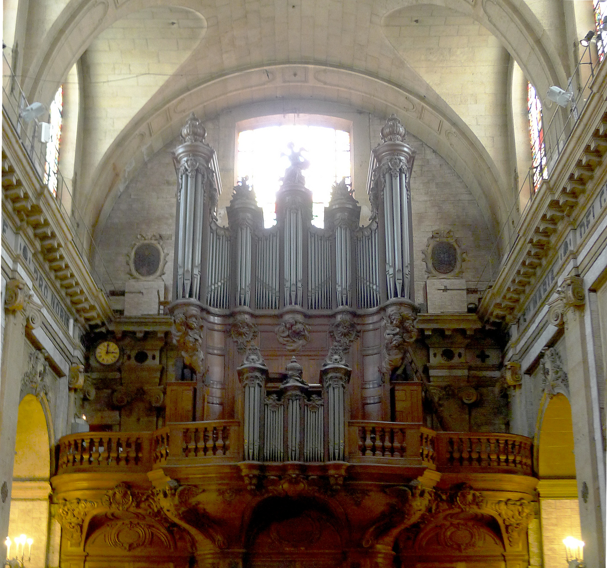 Basilique Notre-Dame-des-Victoires (orgue de tribune) - rwk